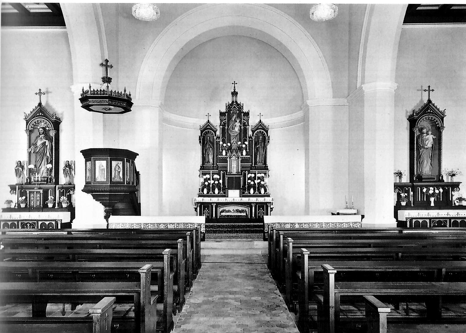 Inneres der Kirche St. Marien am Behnitz, Berlin-Spandau, nach 1964 Quelle: Helmut Kißner, Cordia Schlegelmilch: Die Kirche St. Marien am Behnitz in Spandau. Ein vergessenes Werk August Sollers. Nicolaische Verlagsbuchhandlung GmbH, Berlin 2004, S. 55